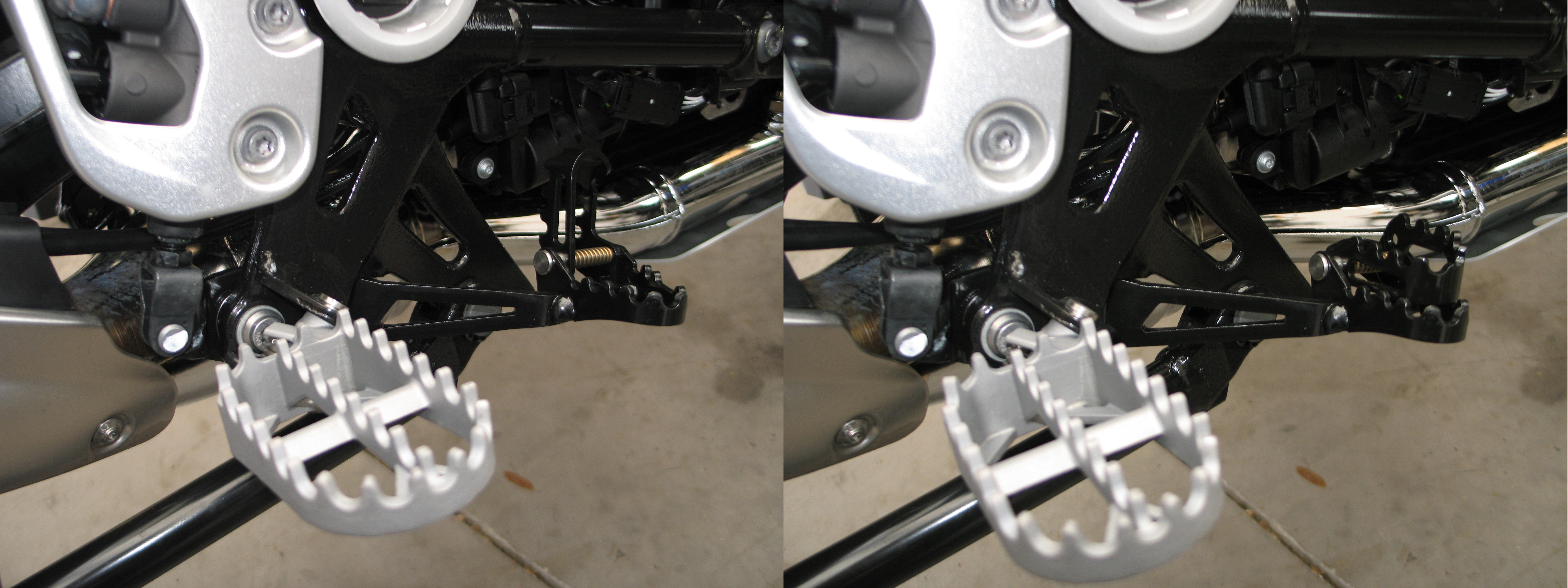 Fußrastenanlage der BMW R1200GSA (K51) mit hoch- und runtergeklapptem Fußbremshebel